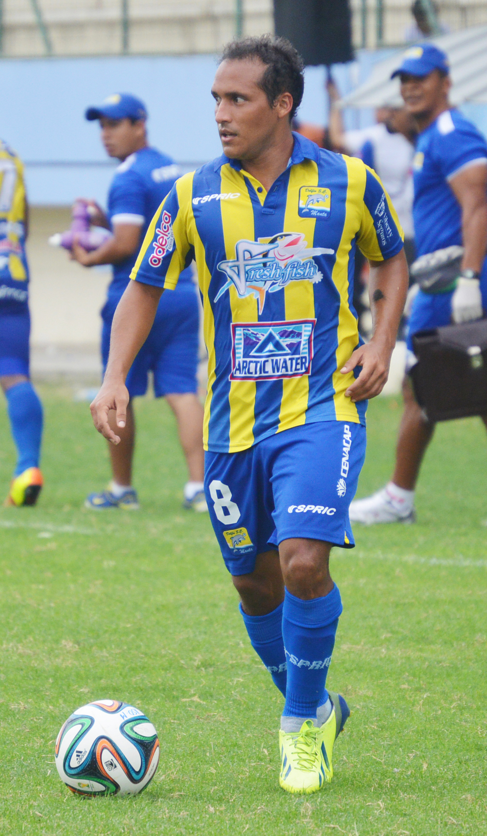 Renato Cedeño en Delfín Sporting Club de Manta en 2014